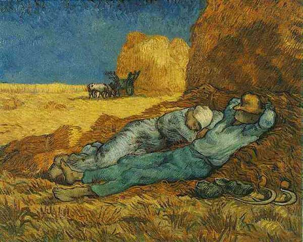 Delelés (La méridienne ; Noonday Rest, 1890) Jean-François Millet 1866-os festménye nyomán